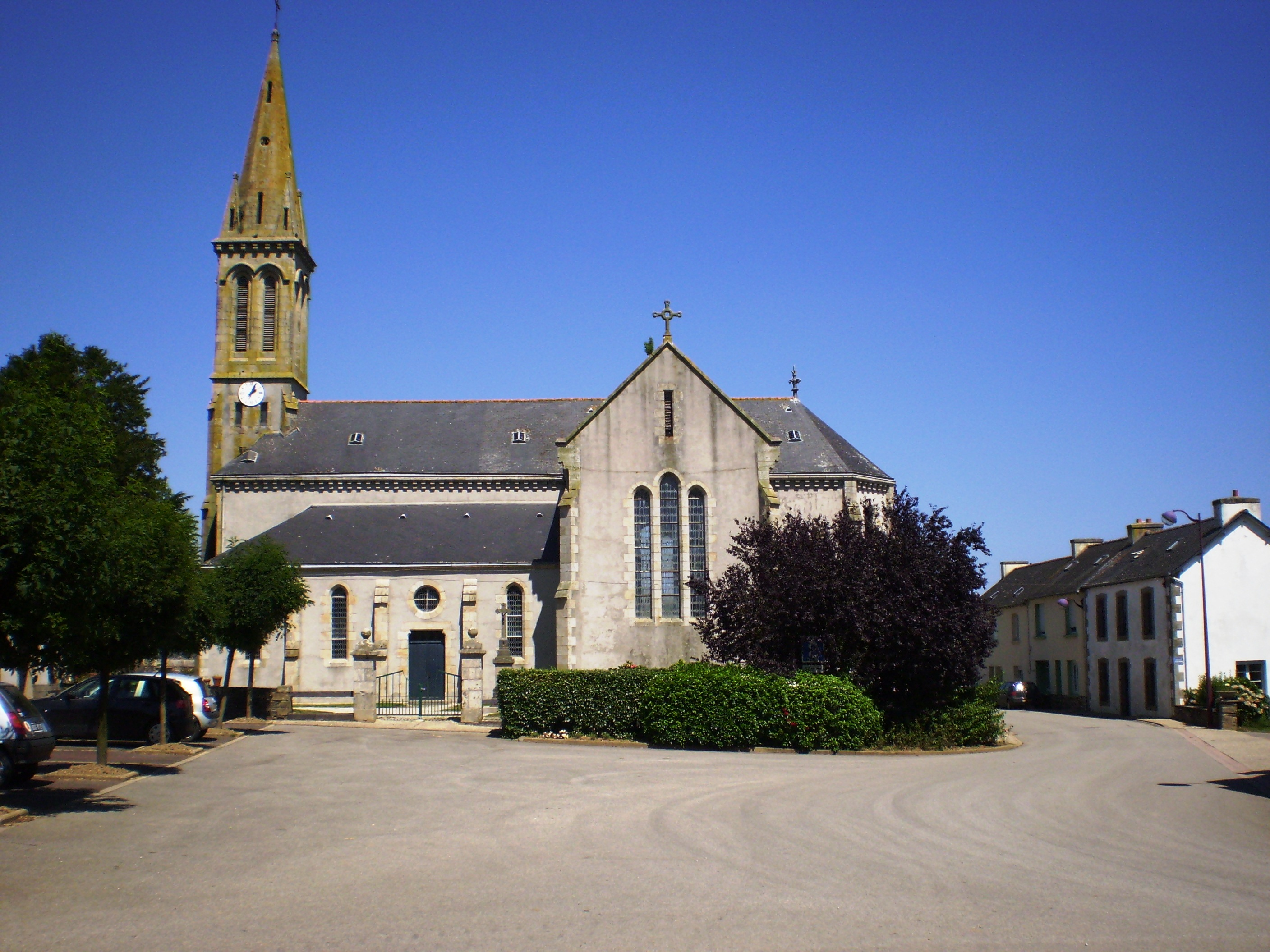 Lothey (Place de l'église) ; l'église paroissiale Saint-Fiacre a été construite entre 1890 et 1900 sur les plans de l'architecte Armand Gassis, de Châteaulin